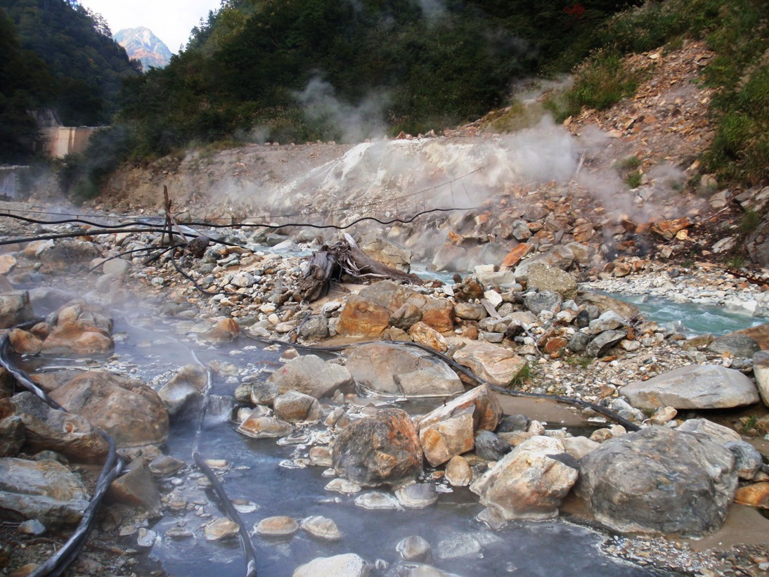 富山県黒部峡谷祖母谷地獄